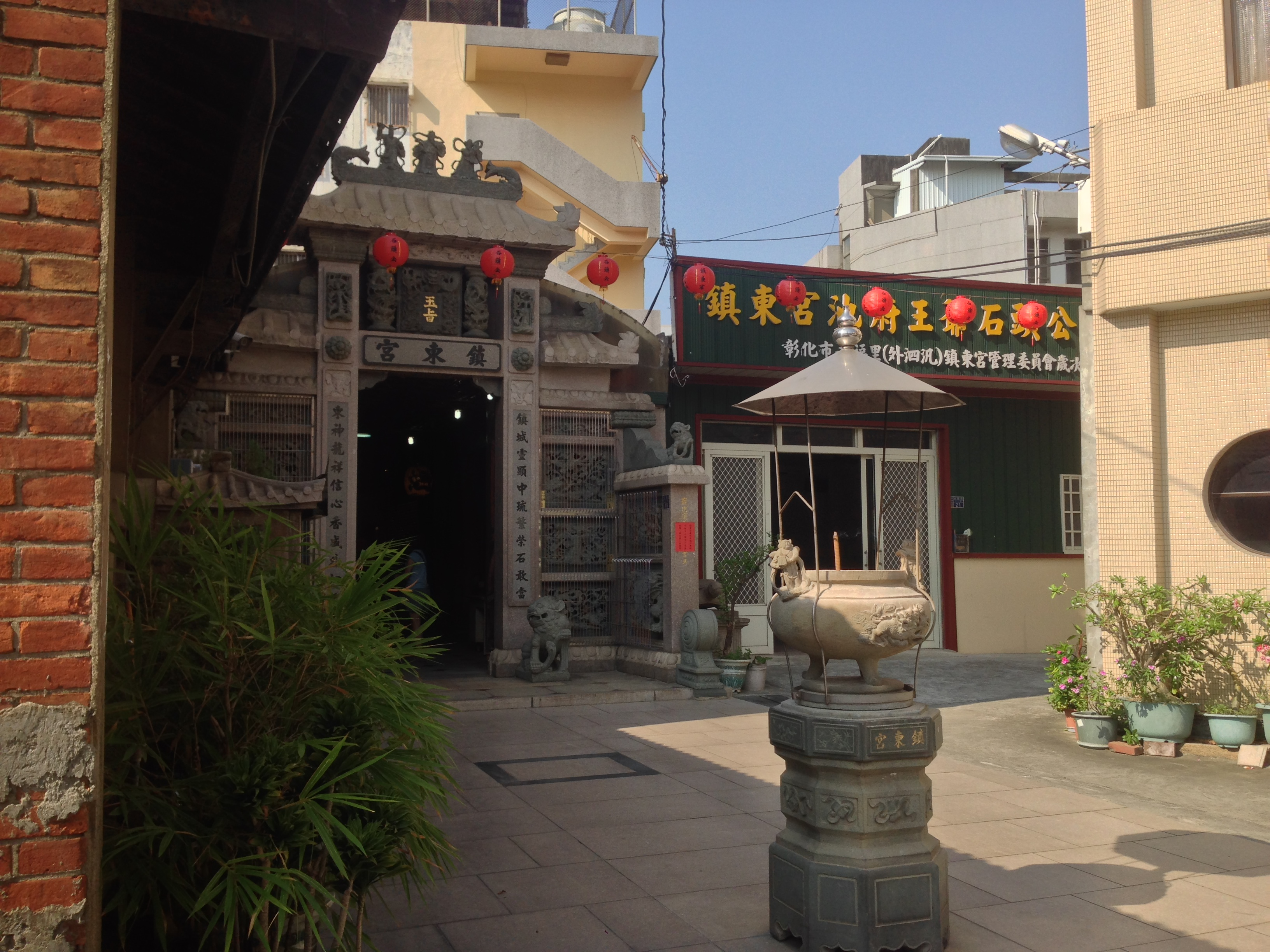 中文（台灣）: 巷弄內的彰化鎮東宮。